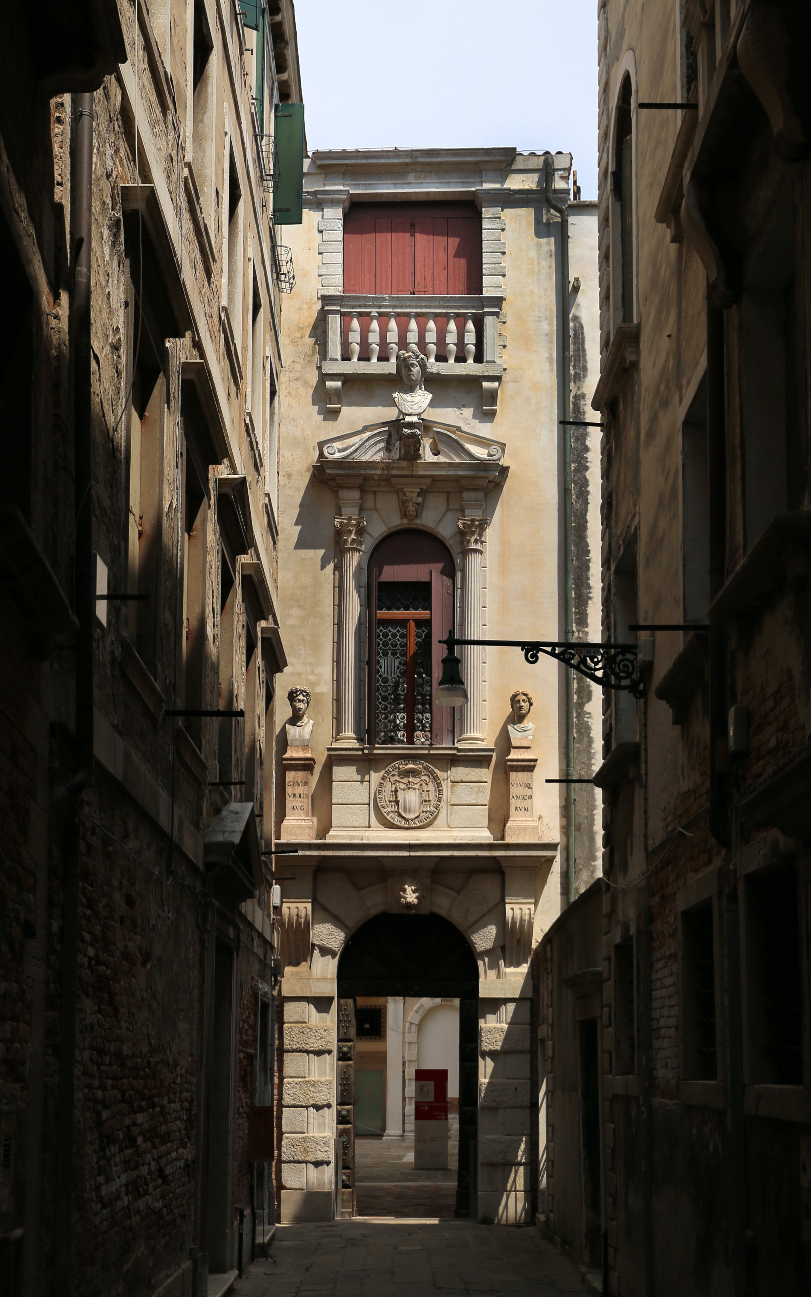 Palazzo Grimani (Castello) This is a photo of a monument which is part of cultural heritage of Italy.